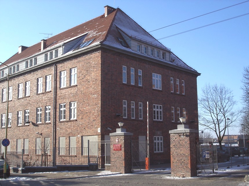 W tym bydynku w Szczecinie stacjonował 12 batalion remontowy, a później 7 Rejonowe Warsztaty Techniczne. Obecnie (2009) - szczeciński IPN